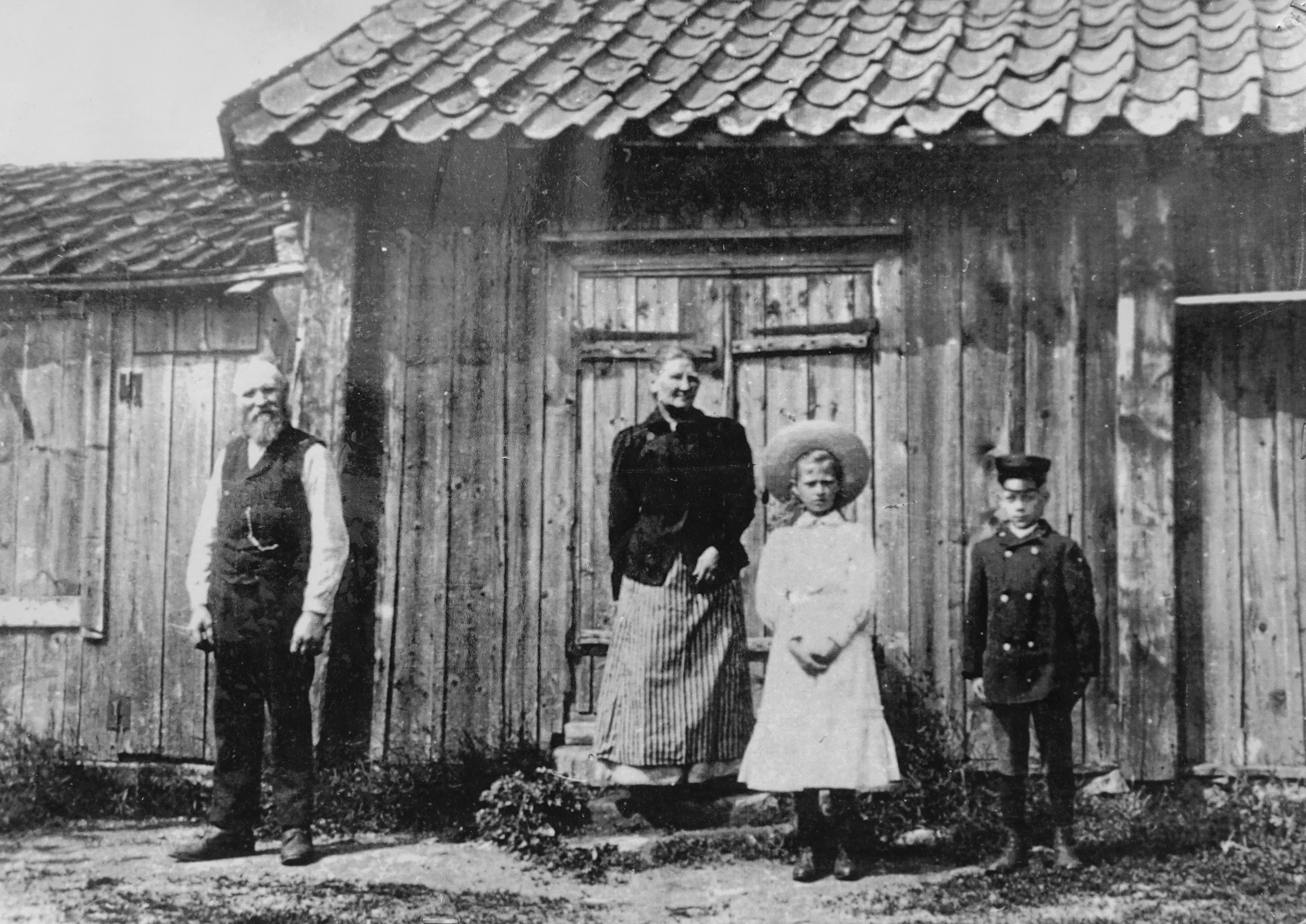 Mjölnaren Abraham Karlsson med hustru framför Överby kvarns kvarnstuga